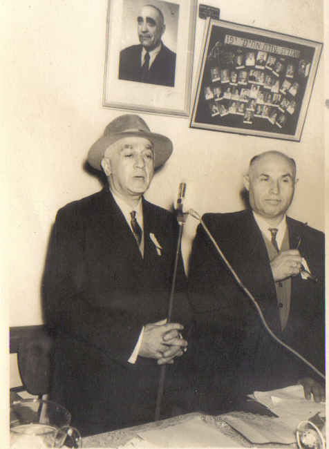 אלברט מיכאל נושא דברים בכנס של אגודת "עזרת אחים" ביפו